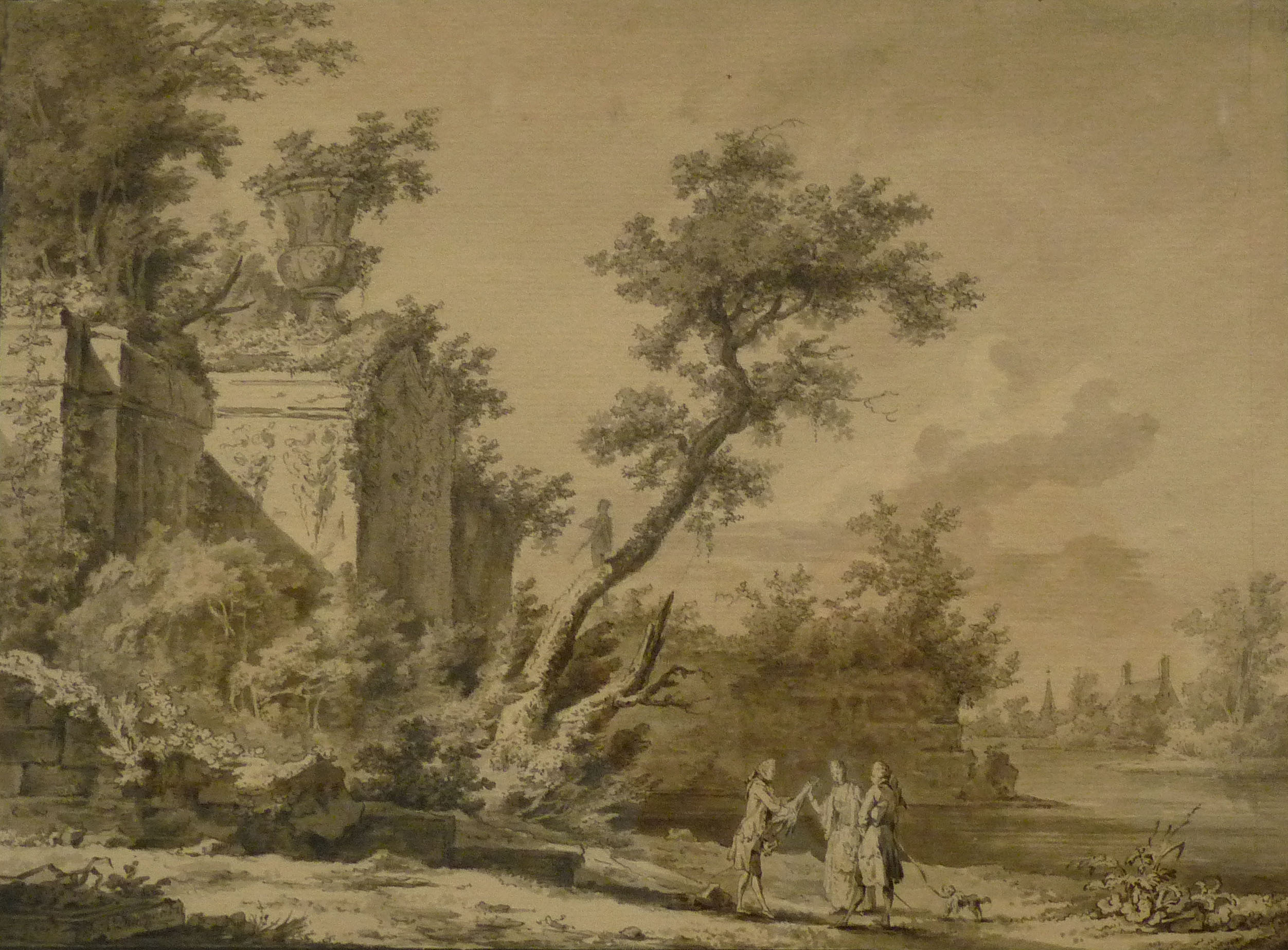 Paysage avec ruines et trois personnages, Balthasar Anton Duncker, plume, lavis gris, date ?, Cabinet des estampes et des dessins de Strasbourg.